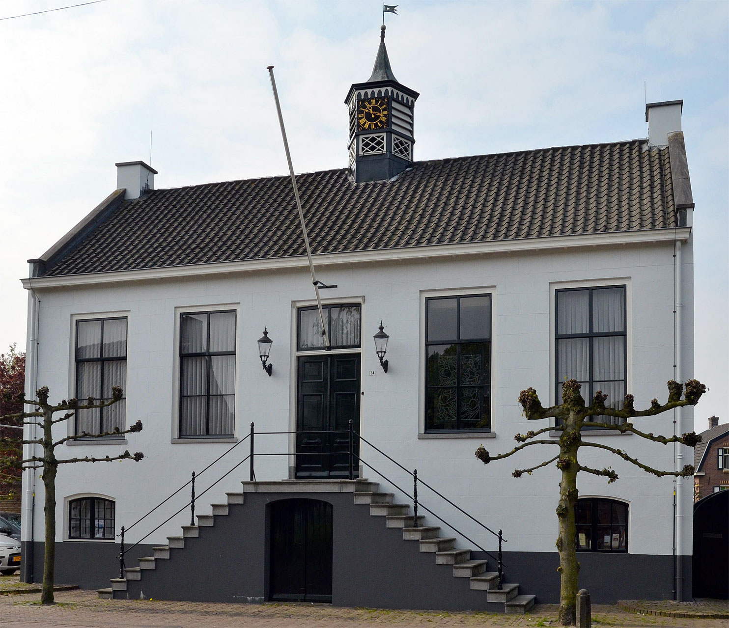 Rijksmonument te Mierlo, Nederland. Voormalig raadhuis, Dorpsstraat 134, Mierlo